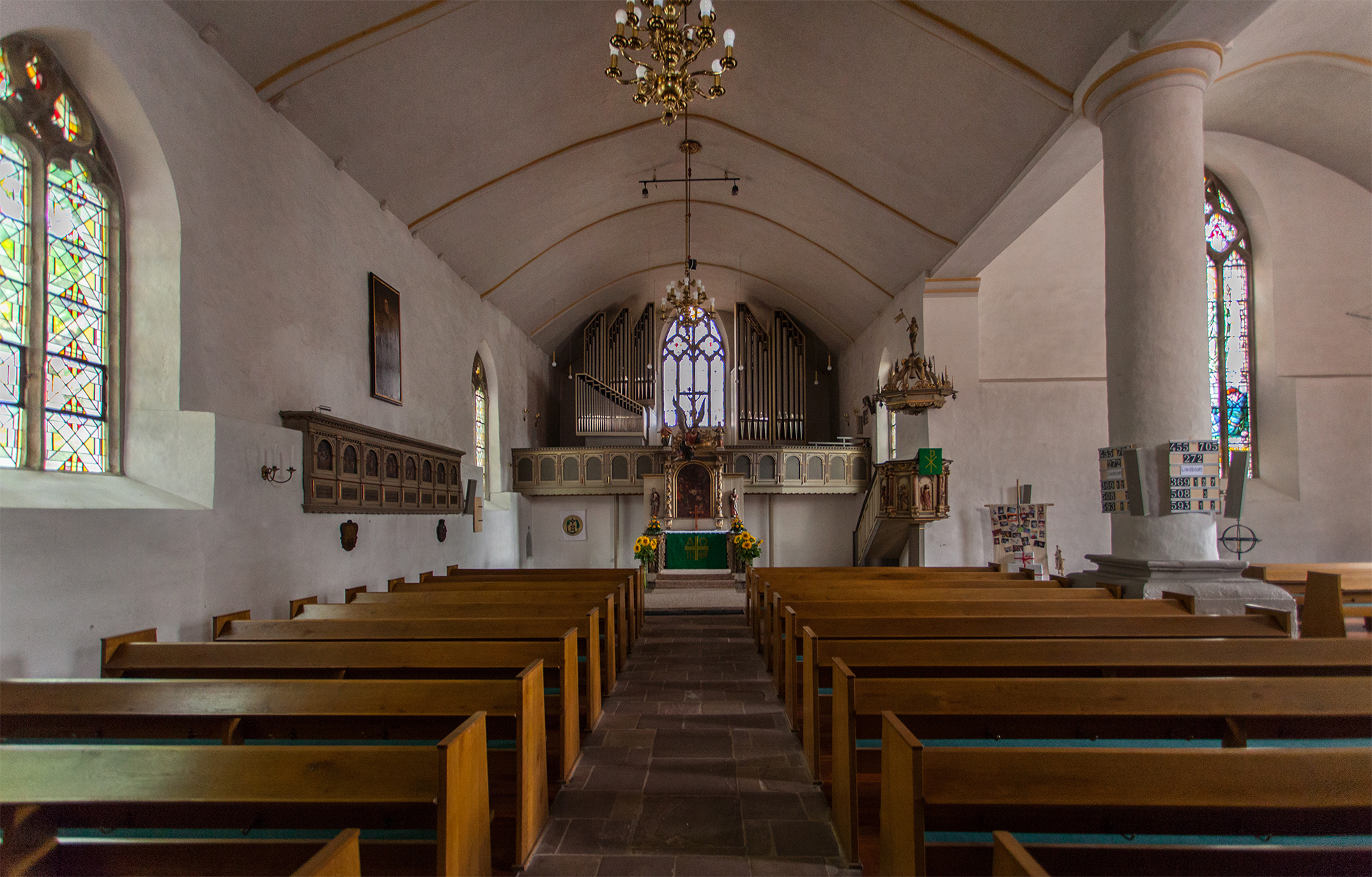 St. Stephanskirche in Vlotho, Innenraum This is a photograph of an architectural monument.